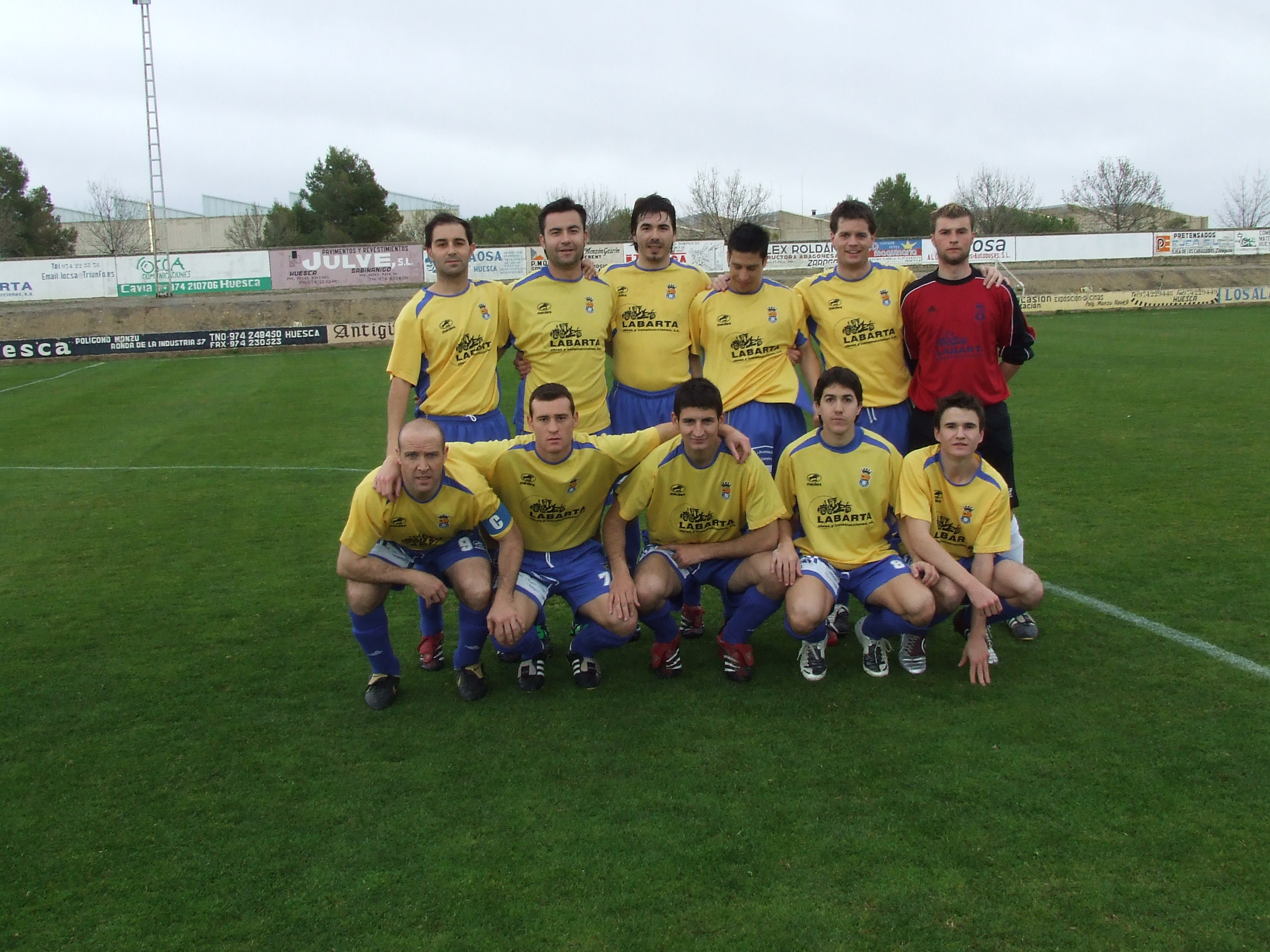 AD Almudévar